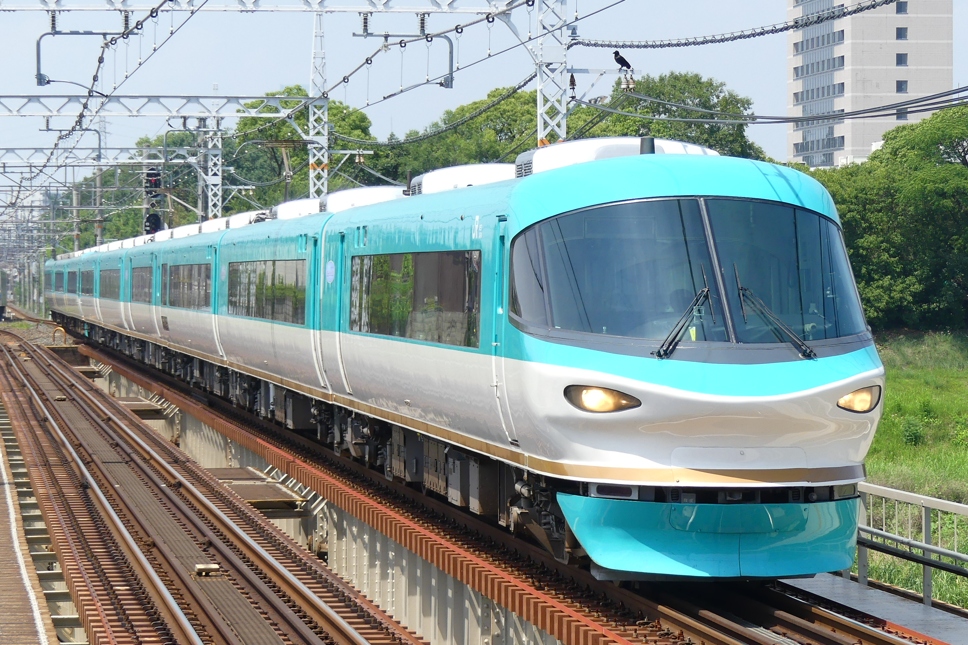 283系オーシャンアロー